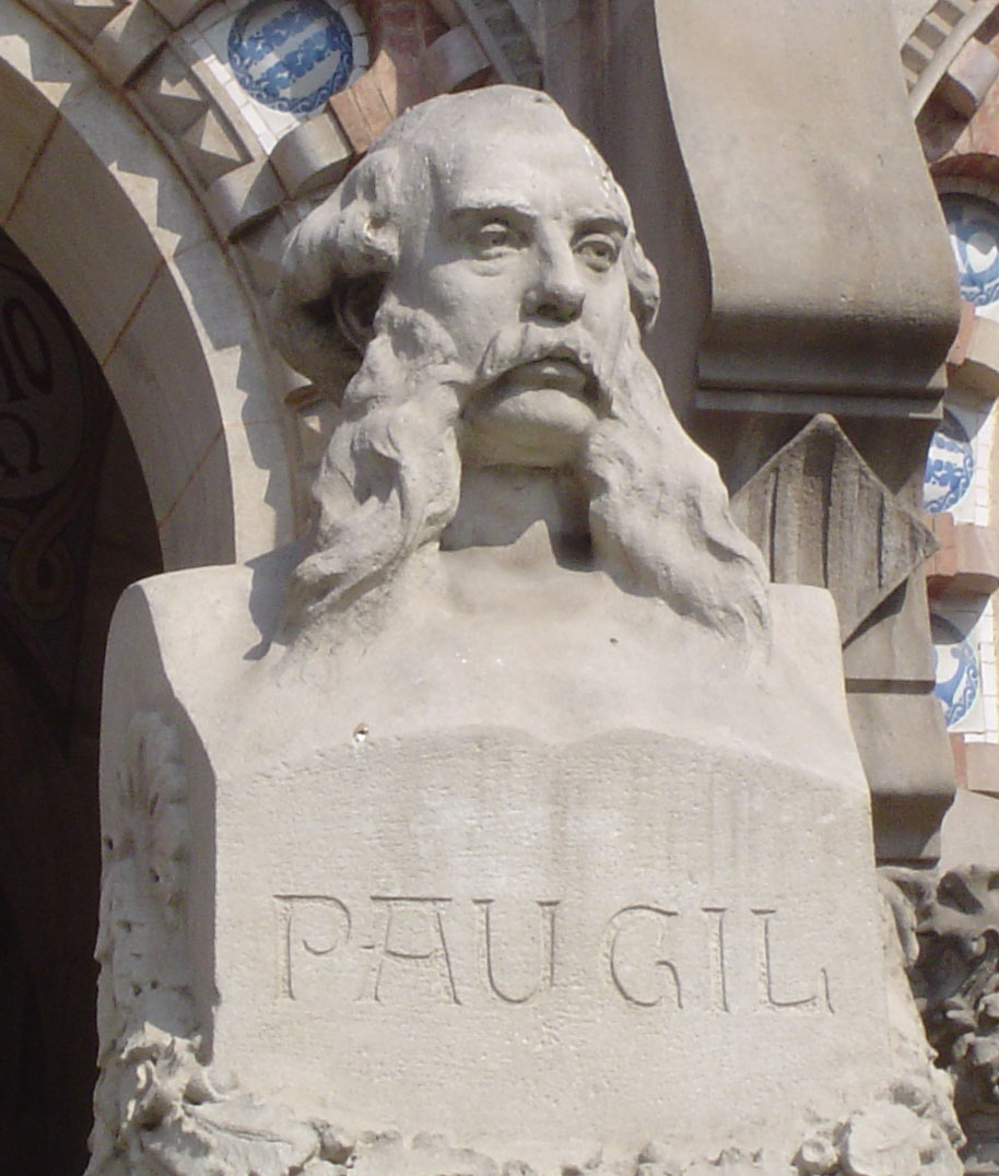 Monumento a Pau Gil ( detalle) por Eusebio Arnau en el Hospital de Sant Pau de Barcelona